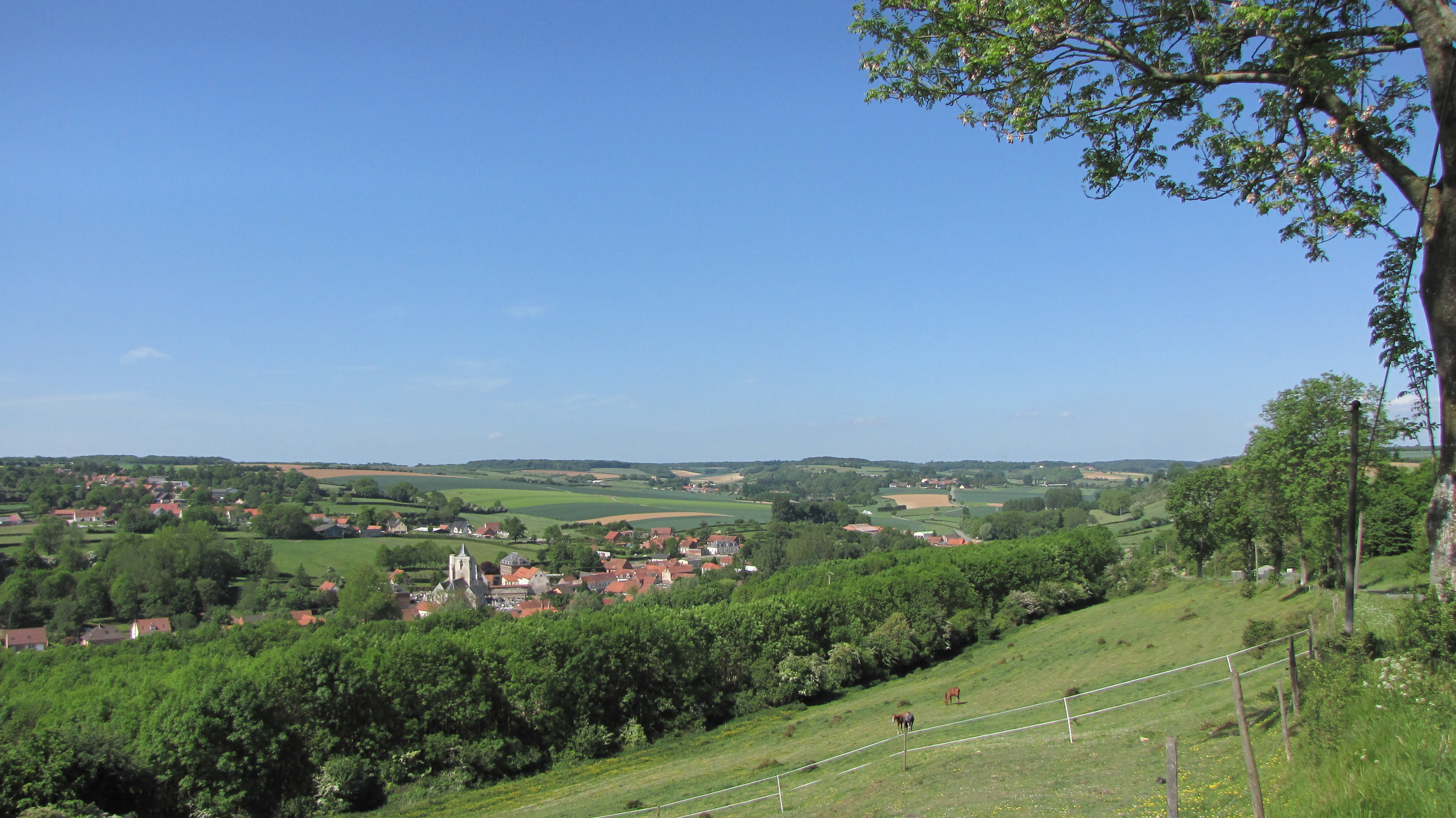 Le bourg d'Acquin